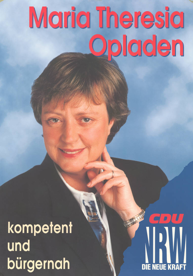 Maria Theresia Opladen kompetent und bürgernah CDU NRW Die neue Kraft Abbildung:PorträtfotoPlakatart:Kandidaten-/Personenplakat mit PorträtObjekt-Signatur:10-009 : 1321Bestand:Landtagswahlplakate Nordrhein-Westfalen (10-009)GliederungBestand10-18:Landtagswahlplakate Nordrhein-Westfalen (10-009) » CDULizenz:KAS/ACDP 10-009 : 1321 CC-BY-SA 3.0 DE